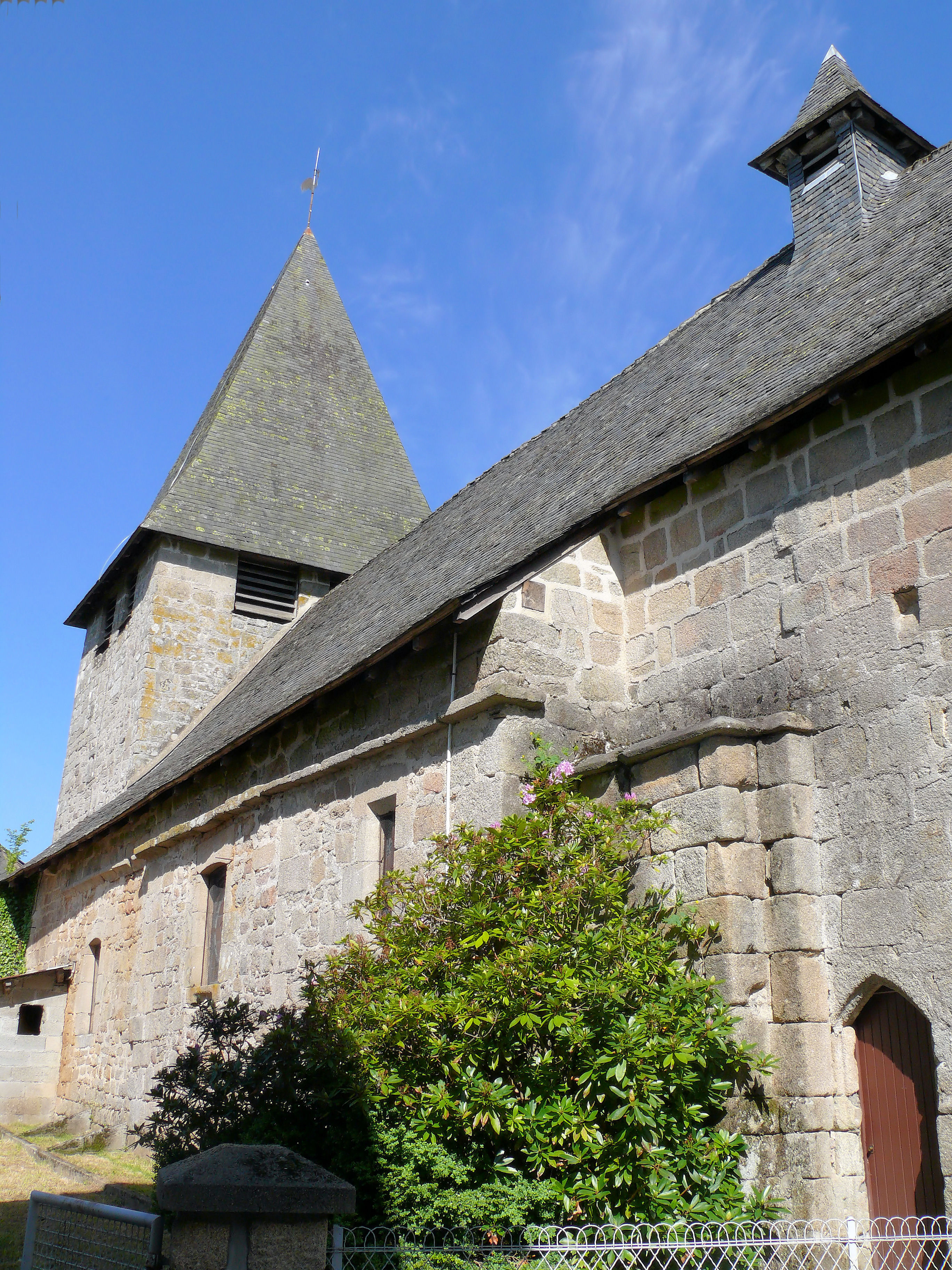 Saint-Augustin (Corrèze) - Eglise Saint-Augustin